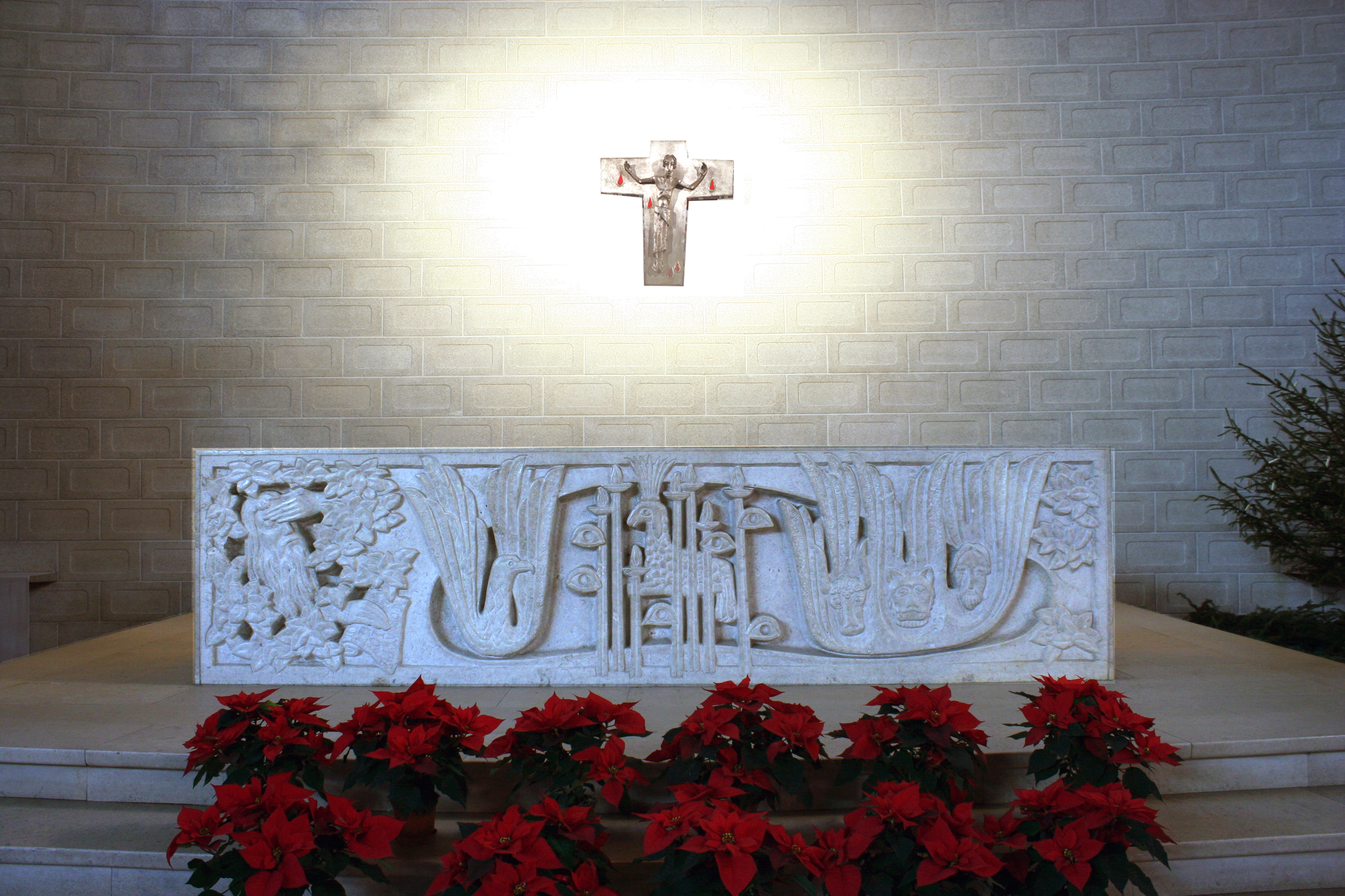 Römisch-katholische Pfarrkirche St. Felix und Regula Zürich-Hard, Kreuz und Altar von Albert Schilling